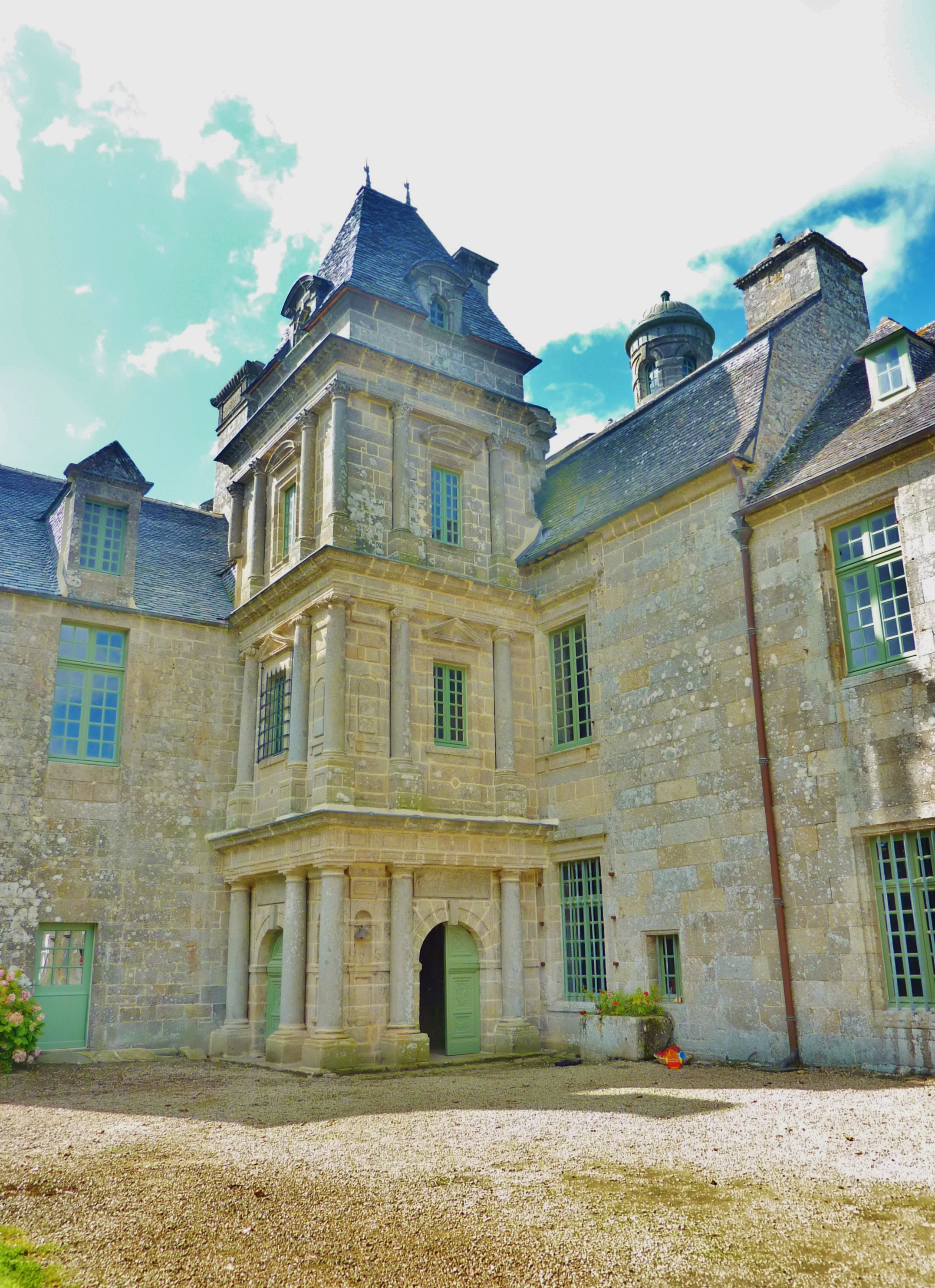 Château de Maillé (Plounévez-Lochrist) : pavillon carré de l'aile gauche de style Renaissance, composé de trois étages décorés de trois rangs superposés de colonnes de style, en commençant par le rang inférieur, successivement toscan, ionique et corinthien.